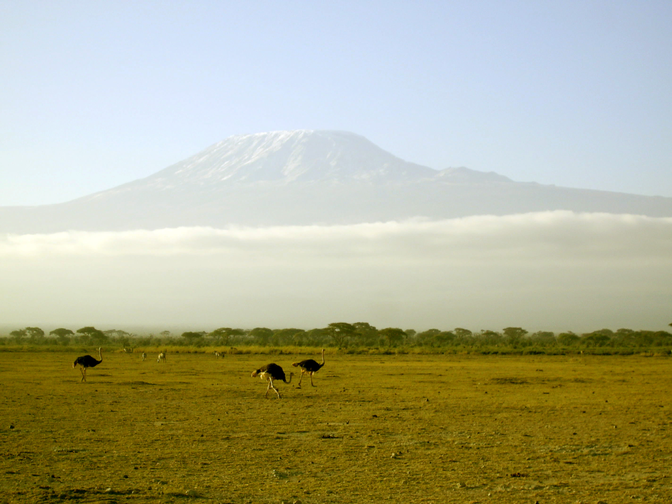 Sträuße mit dem Kilimanjaro im Hintergrund